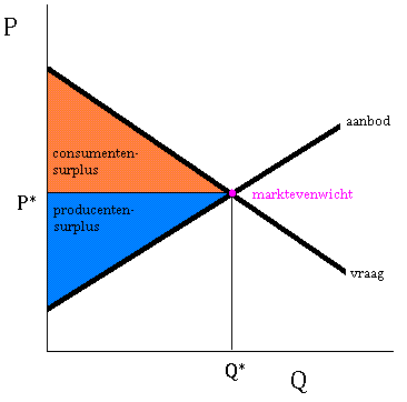 Vraag/aanbodcurve micro-economie met consumenten- en producentensurplus